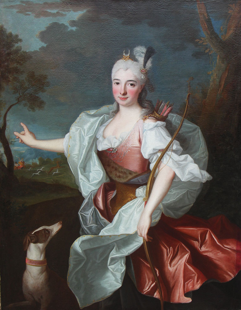 Renée Tranchant du Tret en Diane